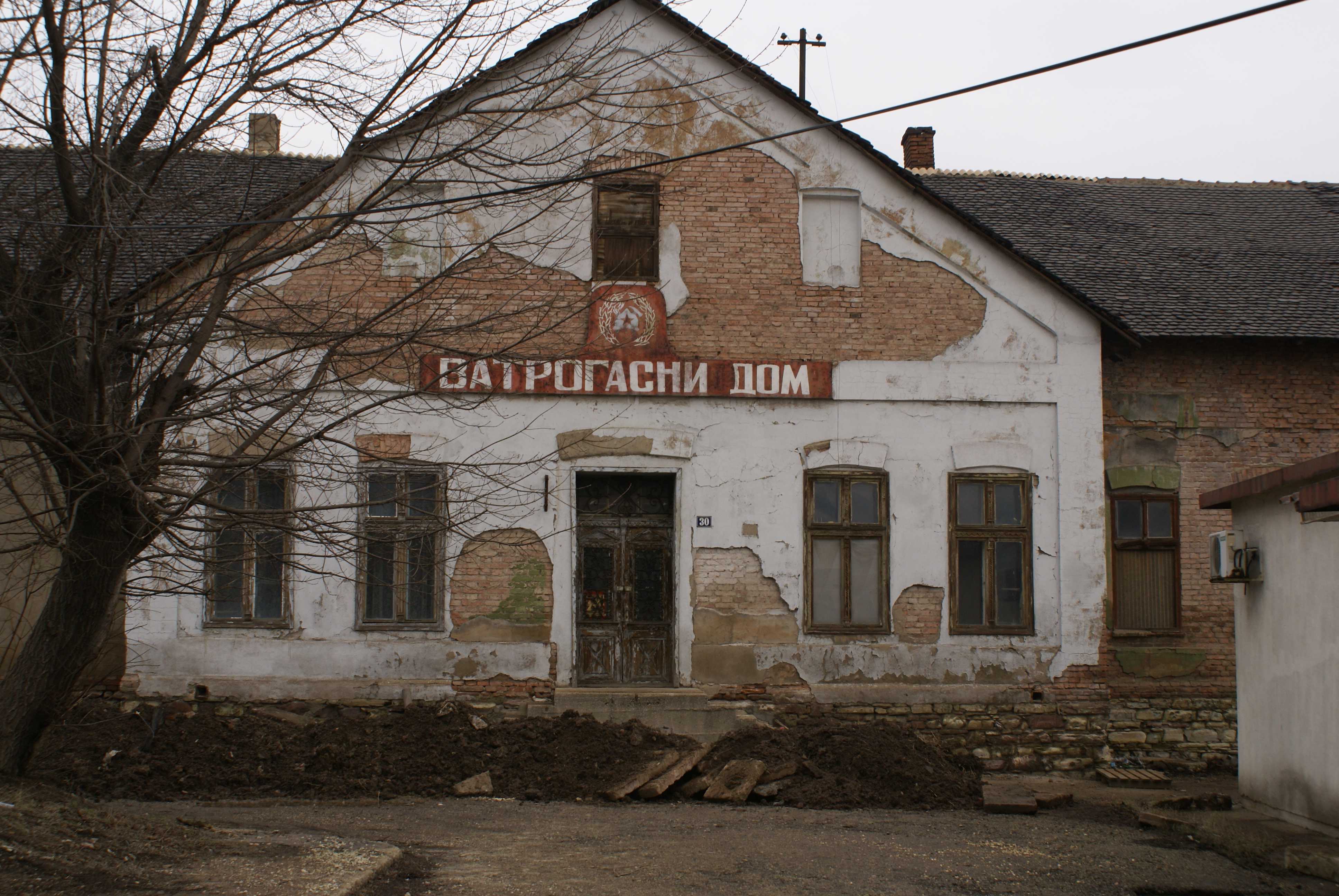 Српски (ћирилица): Весели рудар фронтал